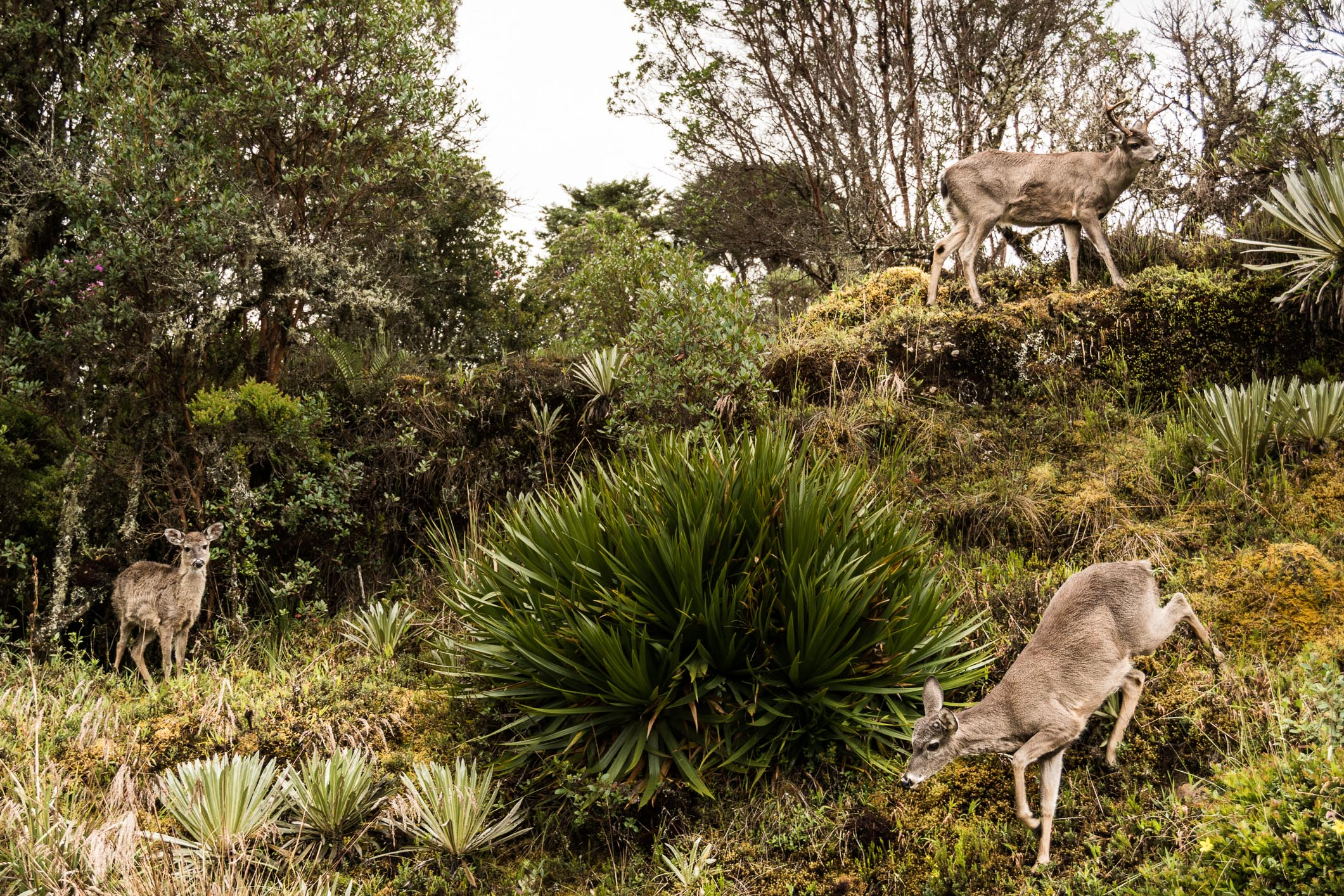 Família de venados de cola blanca en el Parque Nacional Natural Chingaza, 2016